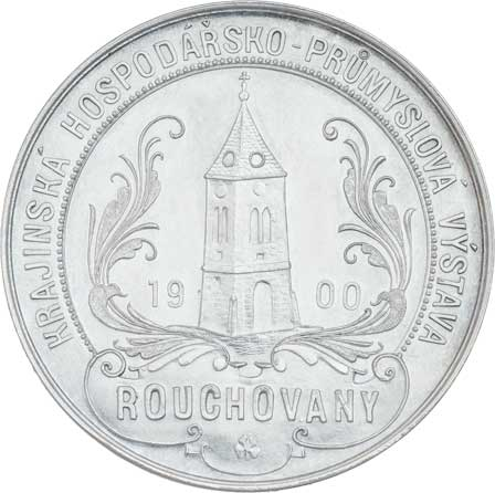 Krajinská hospodářsko průmysl. výstava 1900 sign.: Šmakal Ag 47mm, 33g